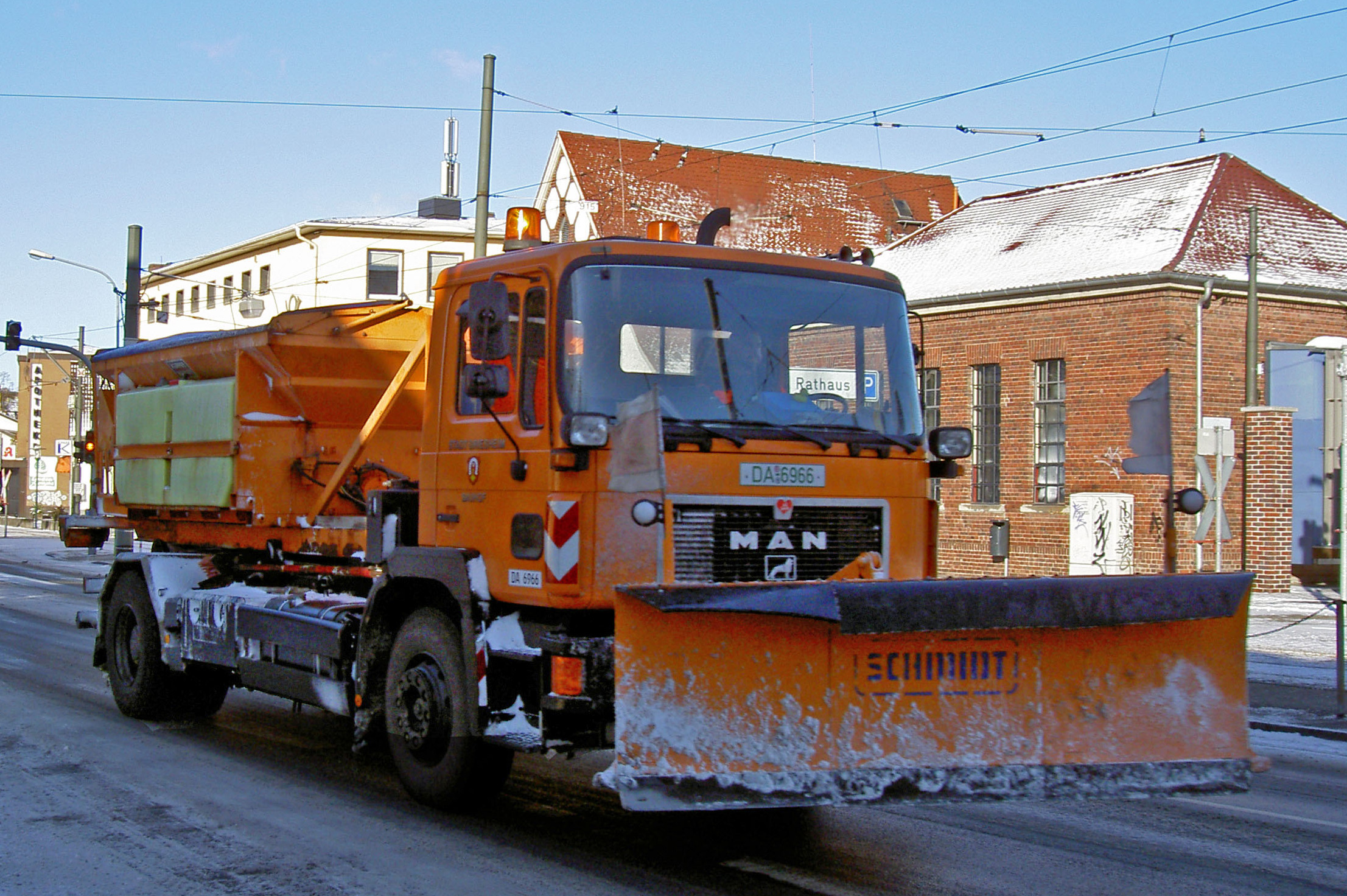 Schneepflug auf einer Bundesstraße